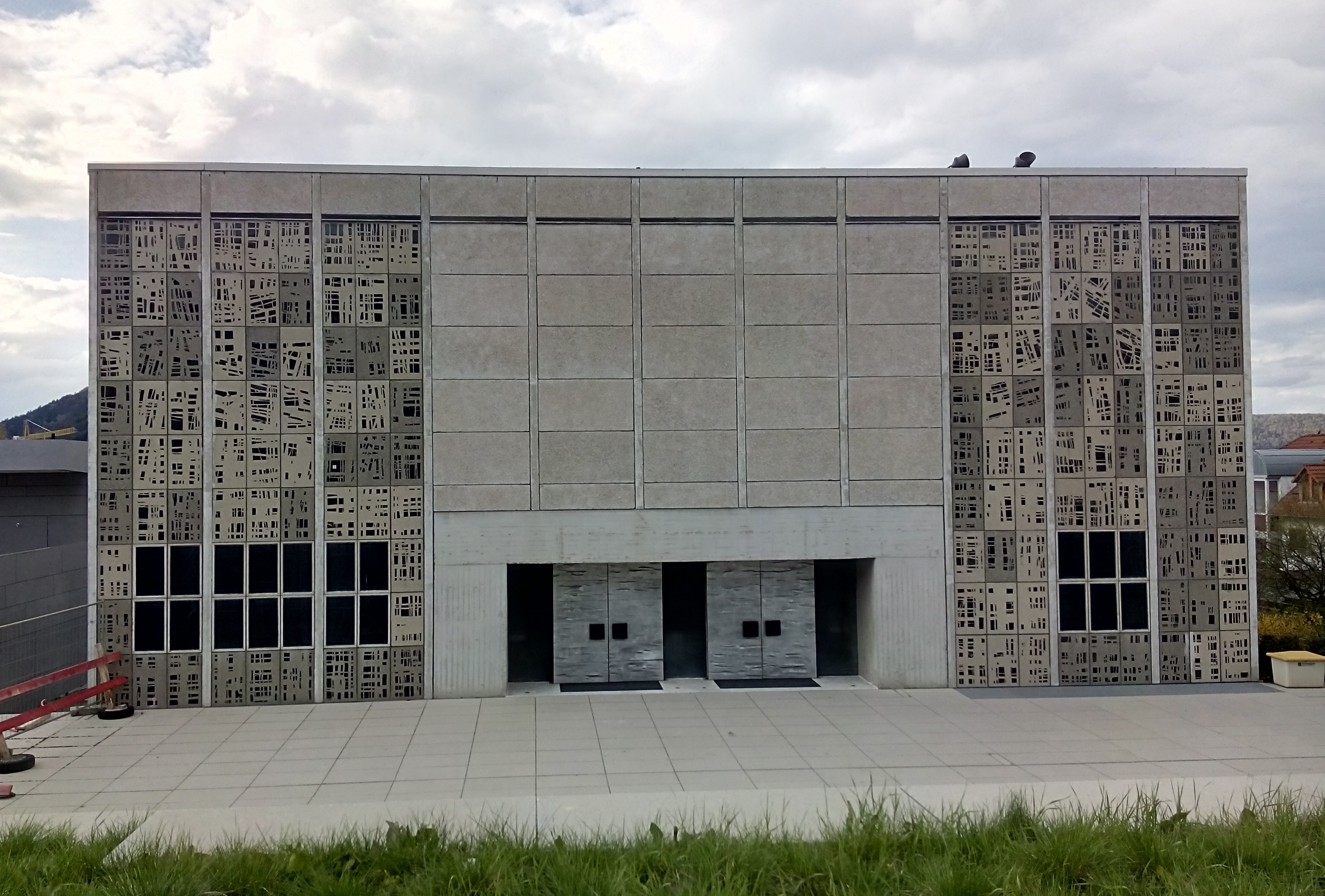 katholische Maria-Königin-Kirche in Tuttlingen, Baden-Württemberg; erbaut 1961-1963